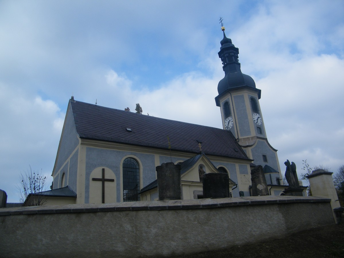 Kostel svatého Bartoloměje ve Velkém Šenově po rekonstrukci